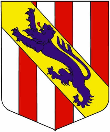 Blason de la commune de Pont-en-Ogoz